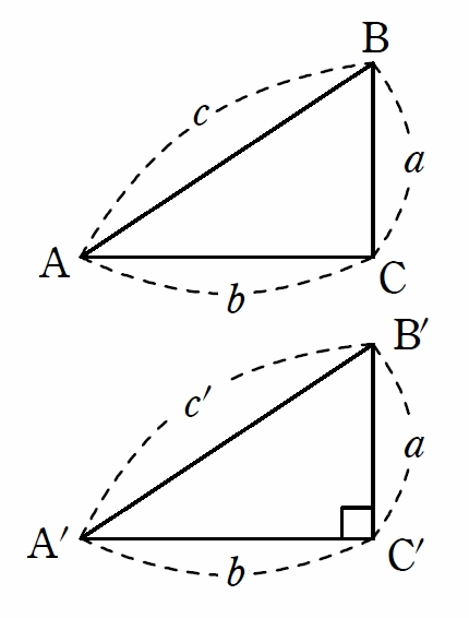 ピタゴラスの定理の逆の証明